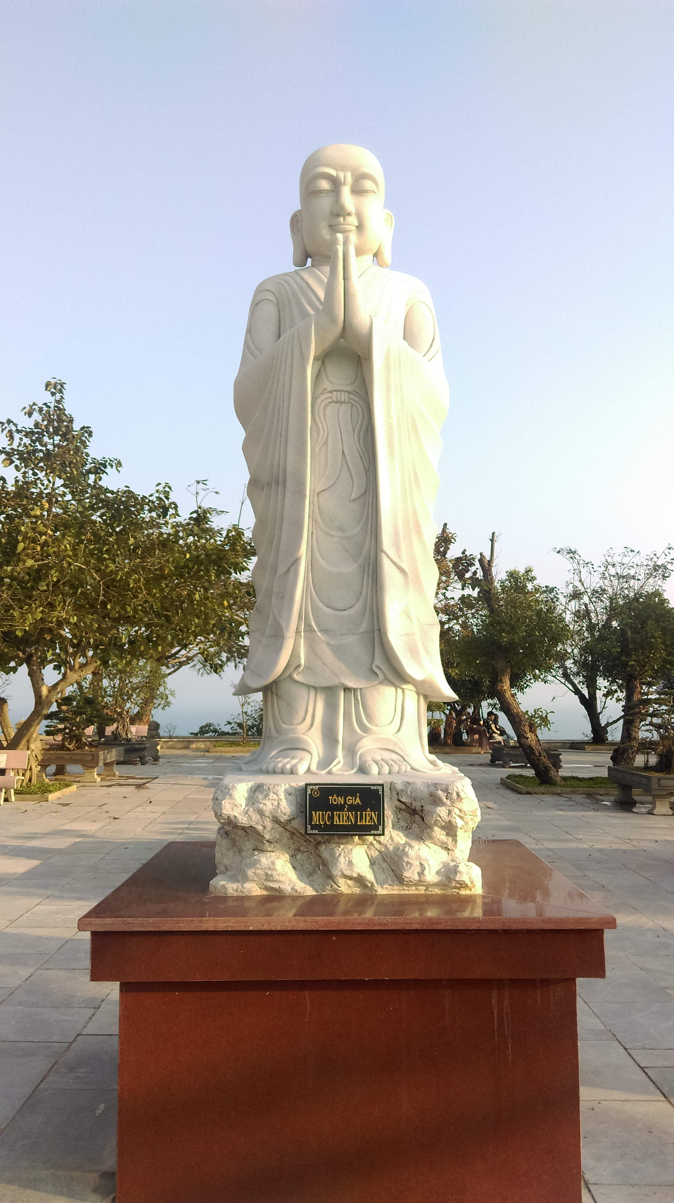 Mục Kiền Liên, chùa Linh Ứng Sơn Trà, Đà Nẵng